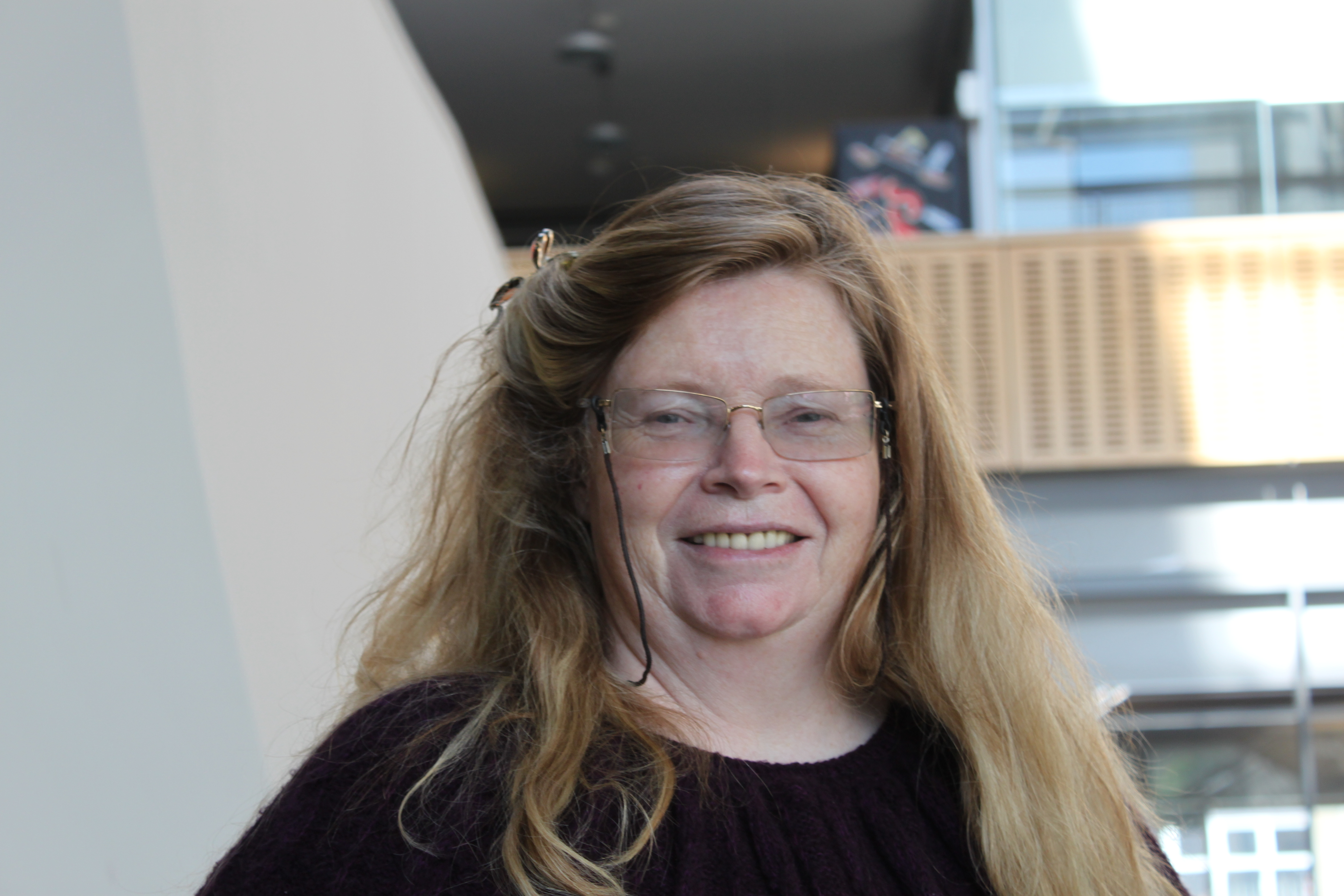 Nuala Ní Dhomhnaill i mBéal Feirste, 08/05/2010.